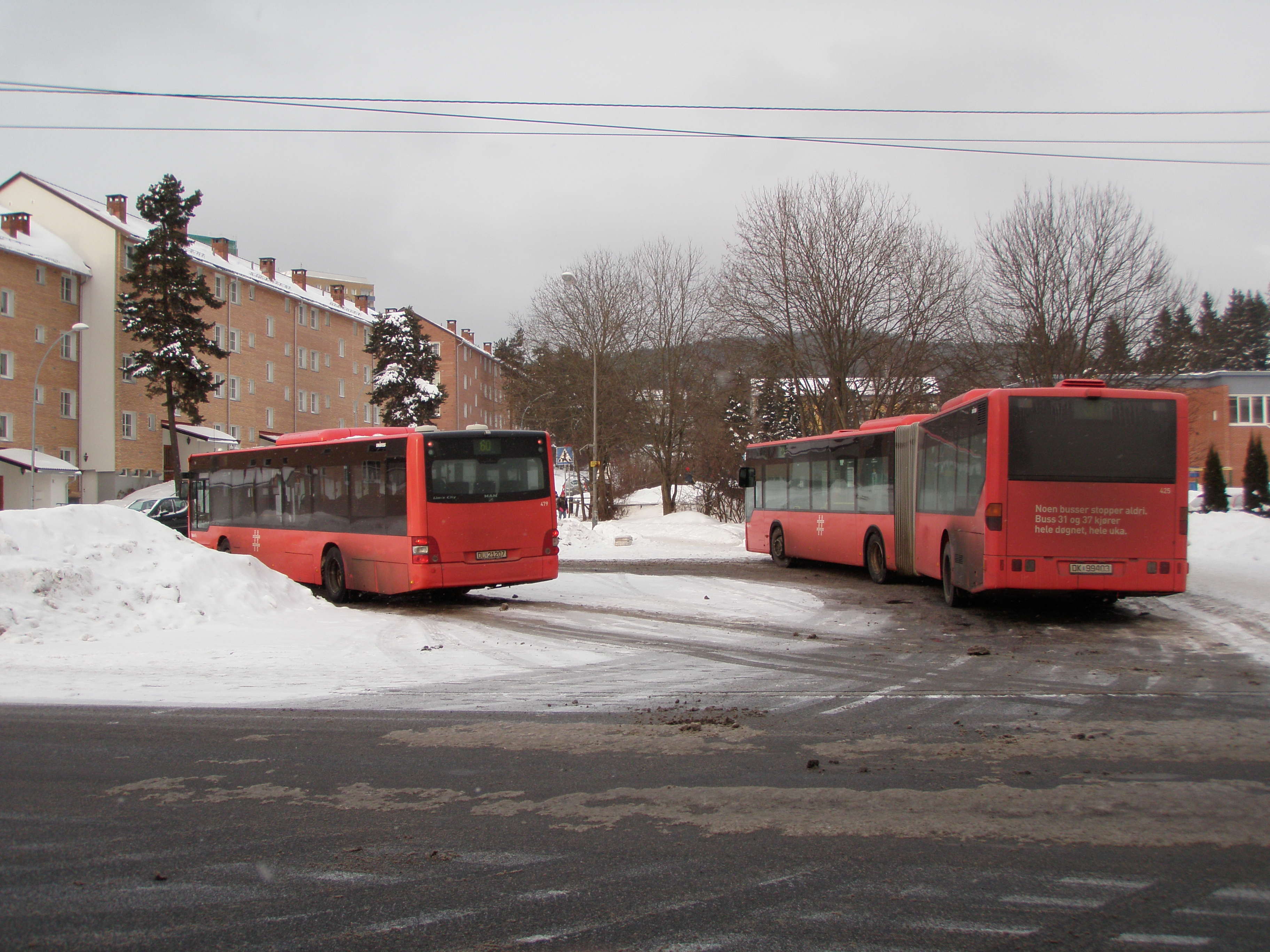 Tonsenhagen bussholdeplass i februar 2011.